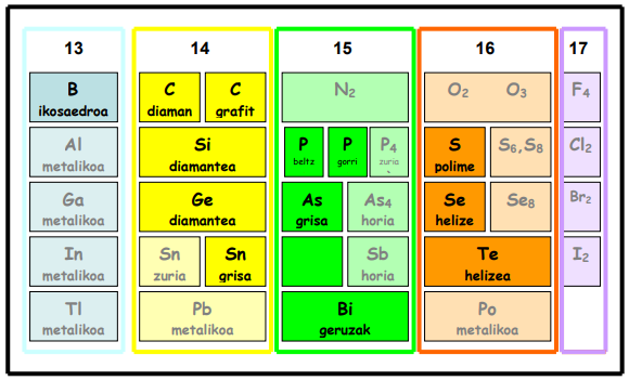 Solido kobalenteak eratzen dituzten elementuak eta forma alotropikoak